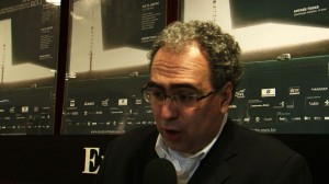 Cineasta brasileiro Amir Labaki em imagem do acervo da TV Brasil.